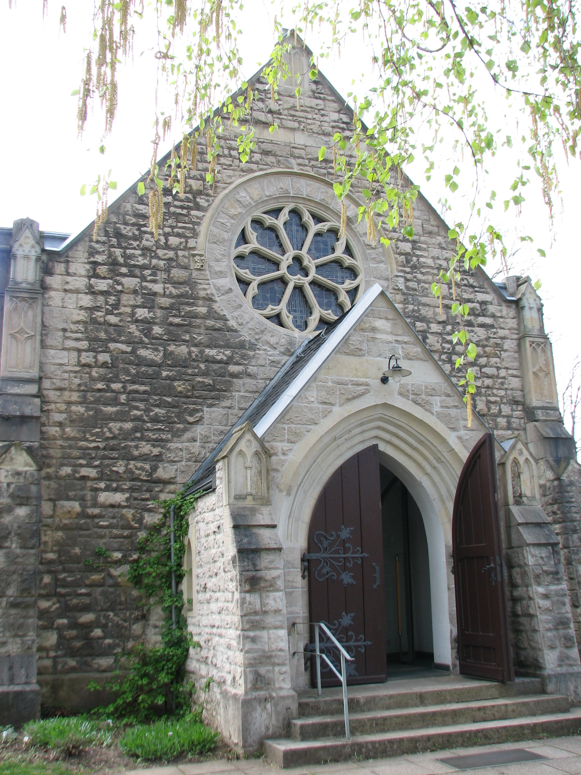 Eingang und rundes Fenster